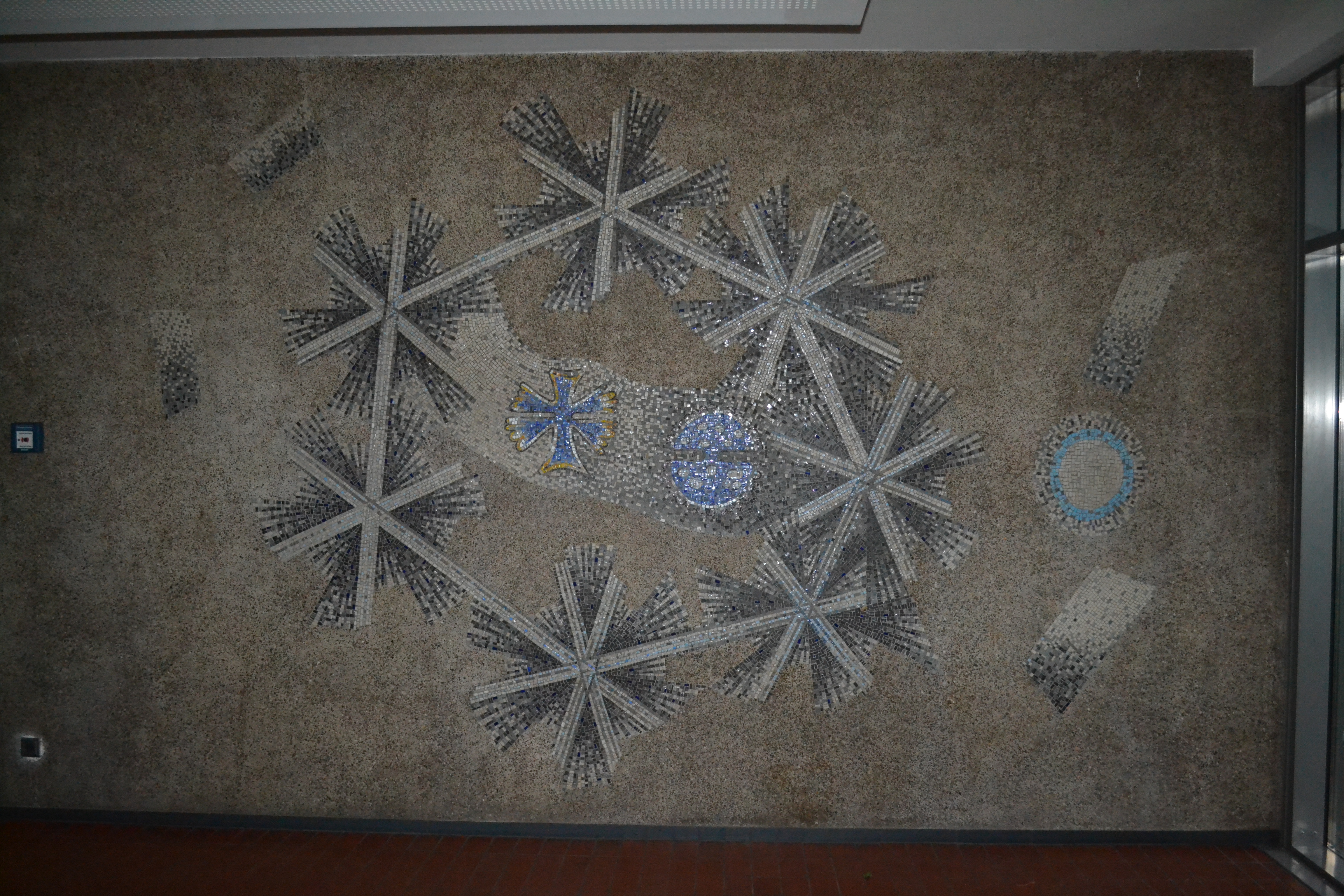 Mosaik "Makrokosmos" von Günter Grote (1955) Eingangshalle des Humboldt-Gymnasiums Düsseldorf